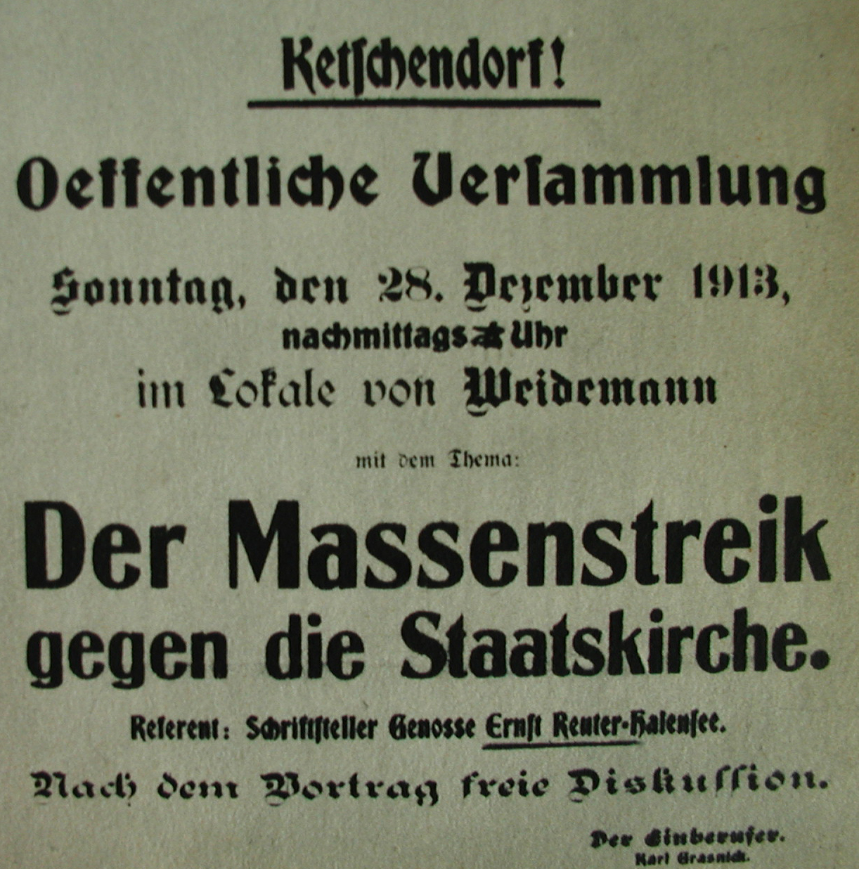 Plakat von Ende 1913 mit Veranstaltungsankündigung, Hauptrechner Ernst Reuter // Bill (end of 1913) announcing Ernst Reuter as main speaker